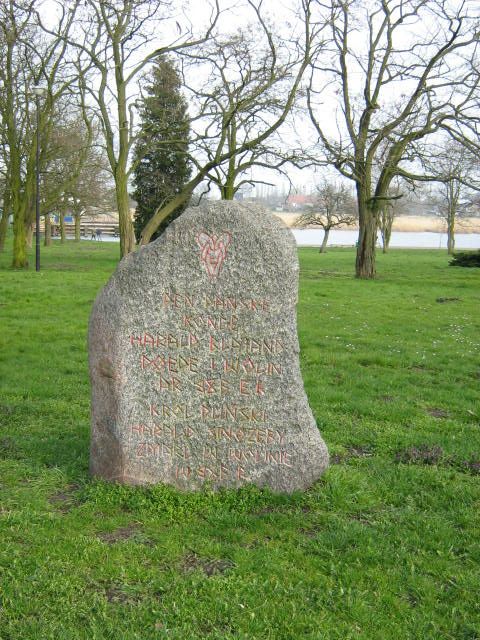 En mindesten i Wolin (se Jomsborg). Indskriften siger på polsk og dansk Den danske konge Harald Blåtand døede i Wolin i år 987